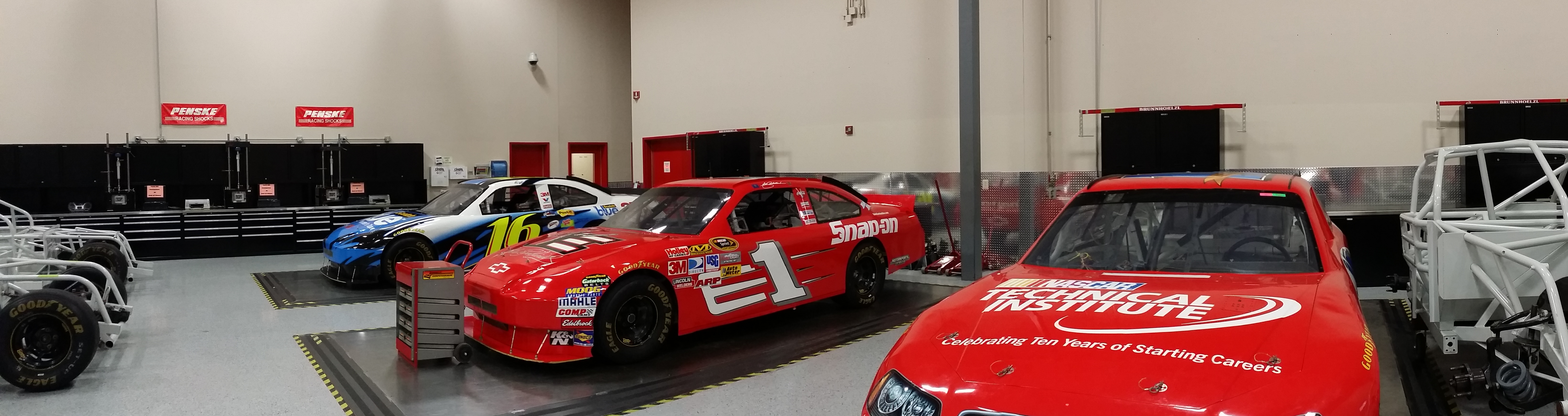 Einige Fahrzeuge in den Hallen des NASCAR Technical Institute